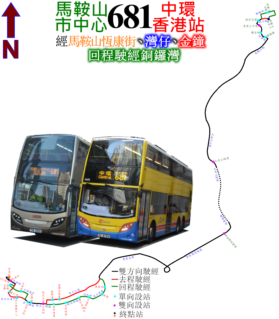 中文（香港）: 過海隧巴681線的走線圖